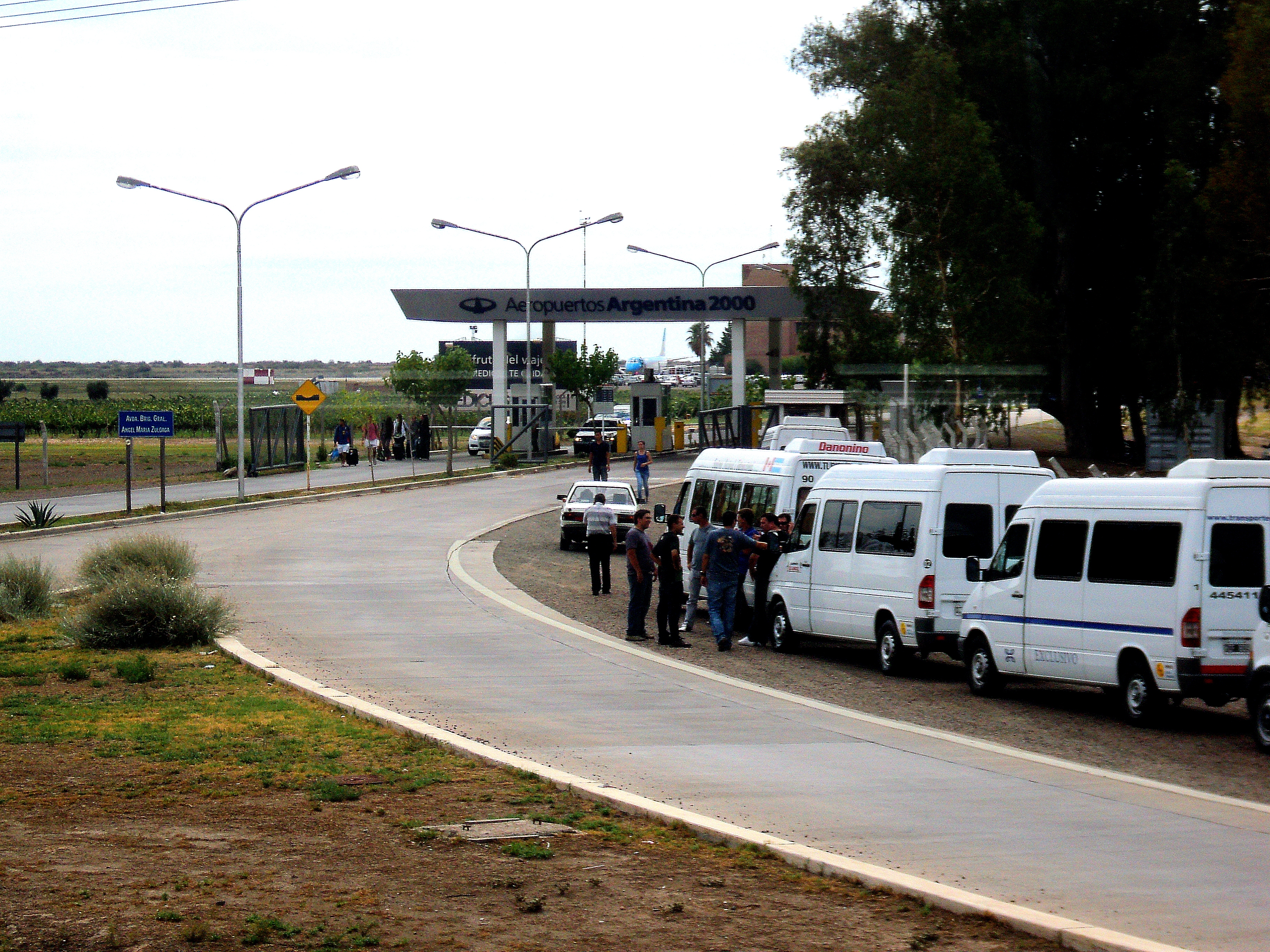 la entrada al aeropuerto de mendoza